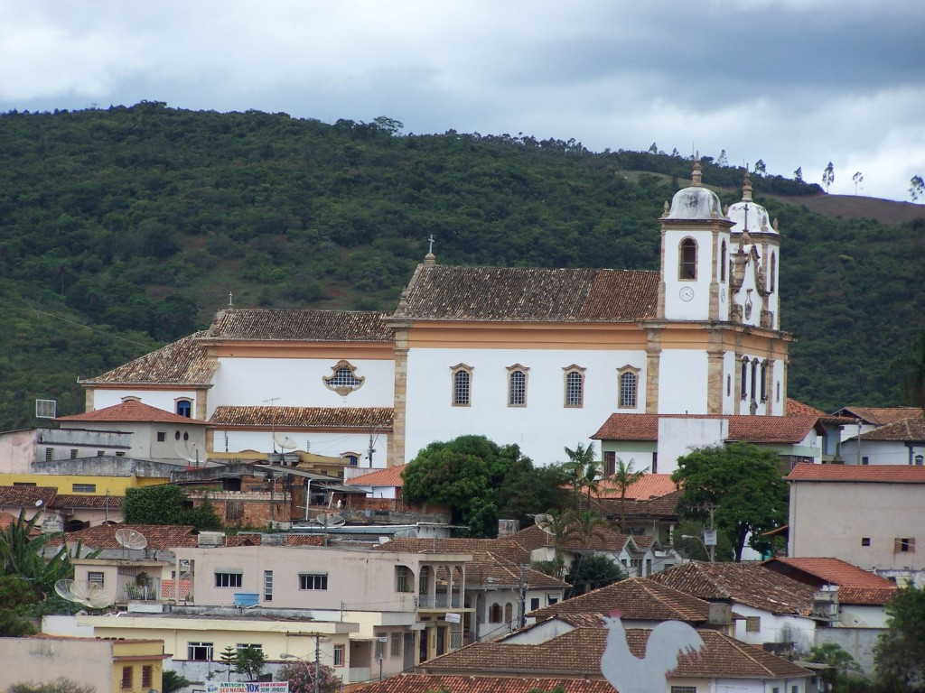 Vista Parcial de Caeté - MG, Brasil.